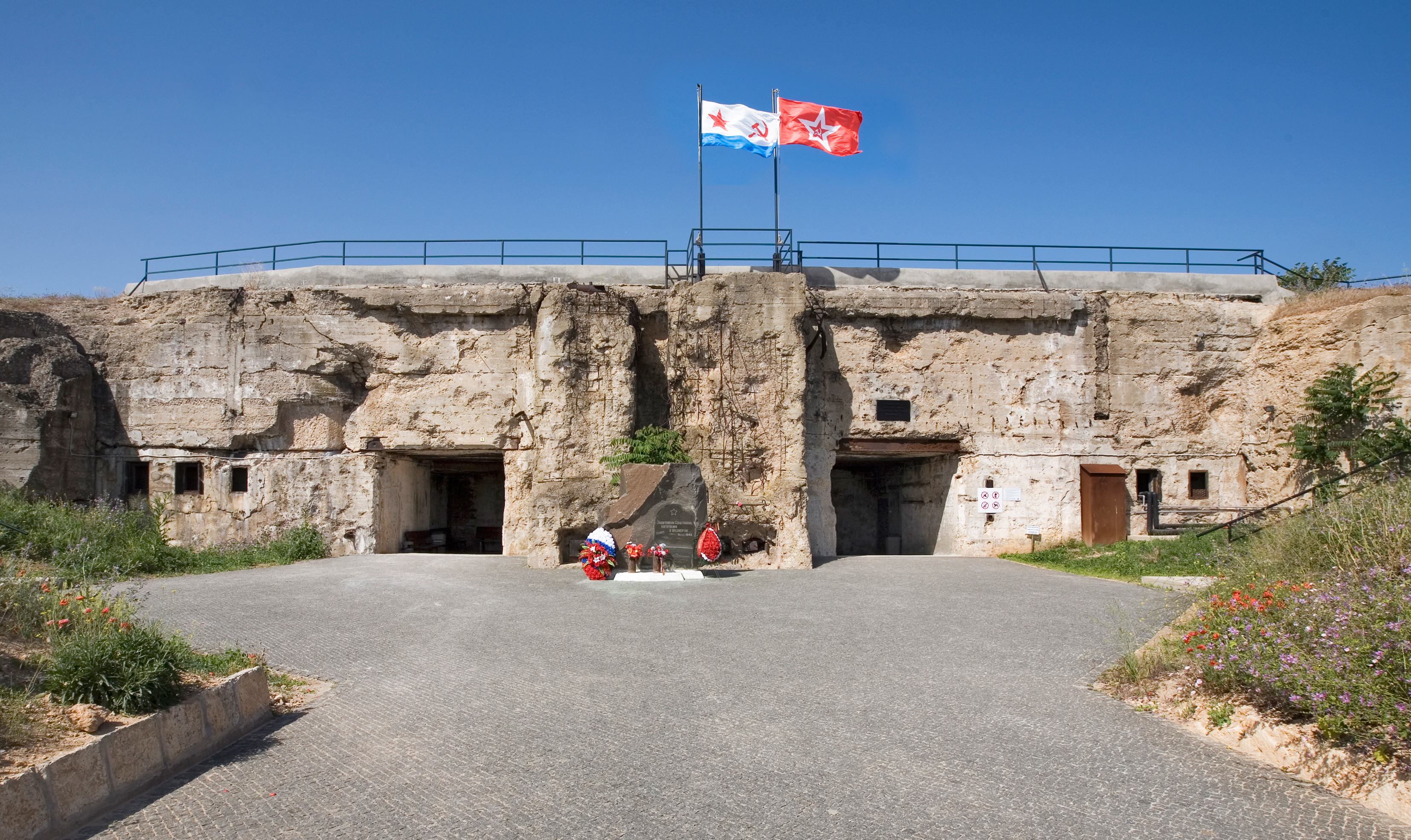 Вход в цитадель